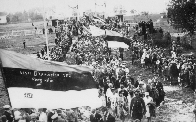 Eesti Rahva Muuseum MuuseumikoguFotokoguNumberERM Fk 2670:185 NimetusIX üldlaulupeo rongkäikOlemusfotoSäilivusmääramata legend Tallinn Fotograaf teadmata, 1928 kommentaar Fk 2670:1 - 227 XX saj esimese poole ajaloolised sündmused (sh vabadussõda), Eesti Vabariigi sõjavägi, politsei, liiklus (sh Tartu - Viljandi mnt ehitamine), turbatootmine, lasteaiad, koolid (sh Tartu Naisühingu Käsitöökool), mälestusmärgid, ühiskondlik - poliitiline elu jm. Fotod on kogutud seoses näituse "Eesti Vabariik 1918 - 1940" ettevalmistamisega 1997. ja 1998. aastal. Fotod saadi Juta Saron`ilt (Tallinn), Endla Peebo`lt (Tartu), Elle Mets`lt (Ulila), Jakob Ellervee`lt (Tartu), Haldja Turp`lt (Nõo), Uno Kullem`lt (Puhja), Kai Luiga`lt (Tartu), Toivo Sikka`lt (ERM), Anne Steinberg`lt (Tallinn) ja osteti antikvariaadist. Fotod kogus, legendeeris ja andis üle ERMi peavarahoidja Evi Astel. v.v. akt 1999:61